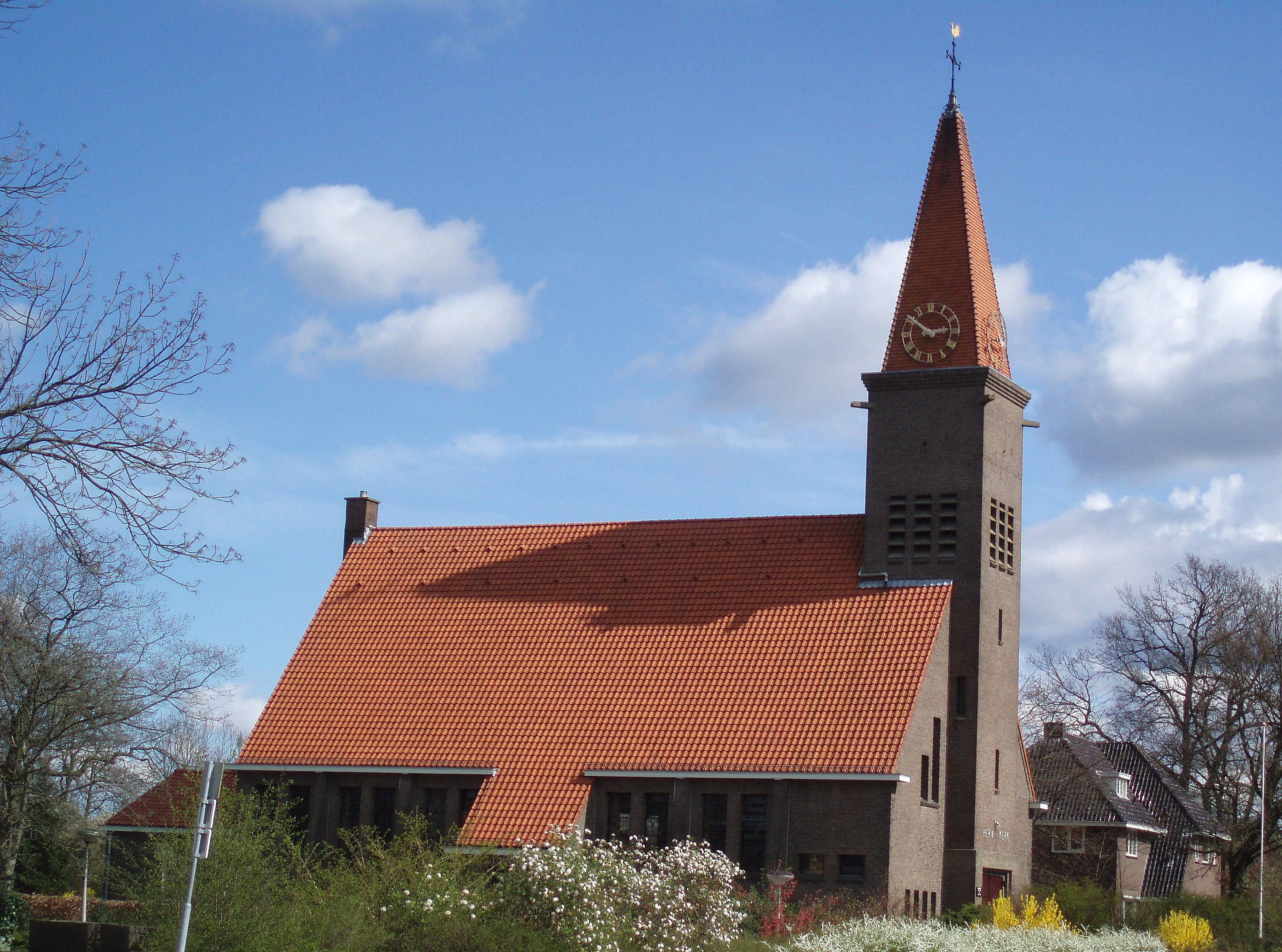 Hervormde kerk in het oliedorp Schoonebeek.